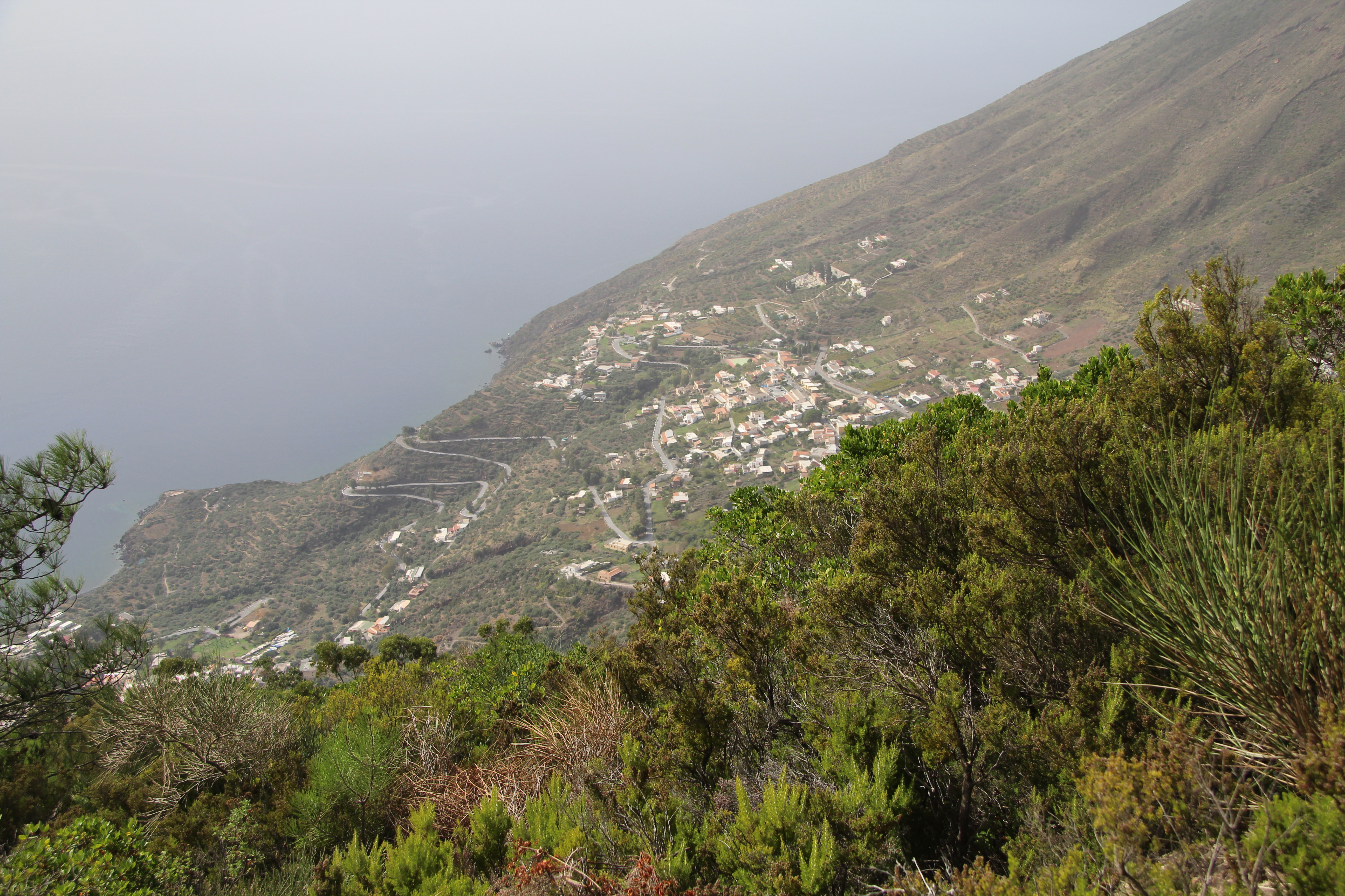 Blick hinunter nach Leni, Salina